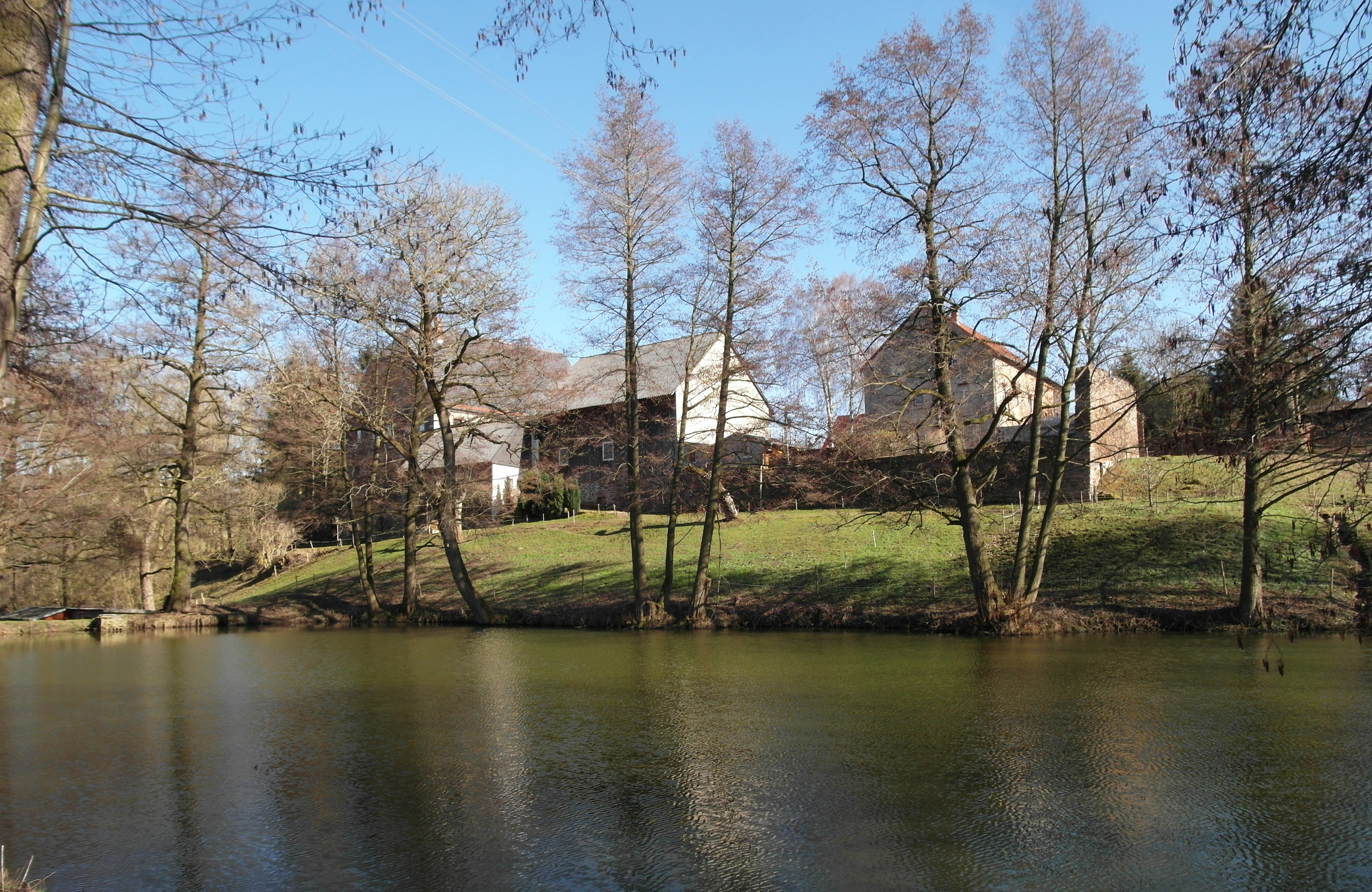 06.04.2018 09661 Arnsdorf (Striegistal), Rittergut: Blick von Nordwesten über über einen Teich der Fischteichkaskade zu den Gebäude des Gutes, darunter Haus Berbersdorfer Str. 29 (GMP: 51.010551,13.142872). [SAM5052.JPG]20180406620DR.JPG(c)Blobelt